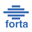 Logo de la Federación de Organismos de Radio y Televisión Autonómicos (FORTA).